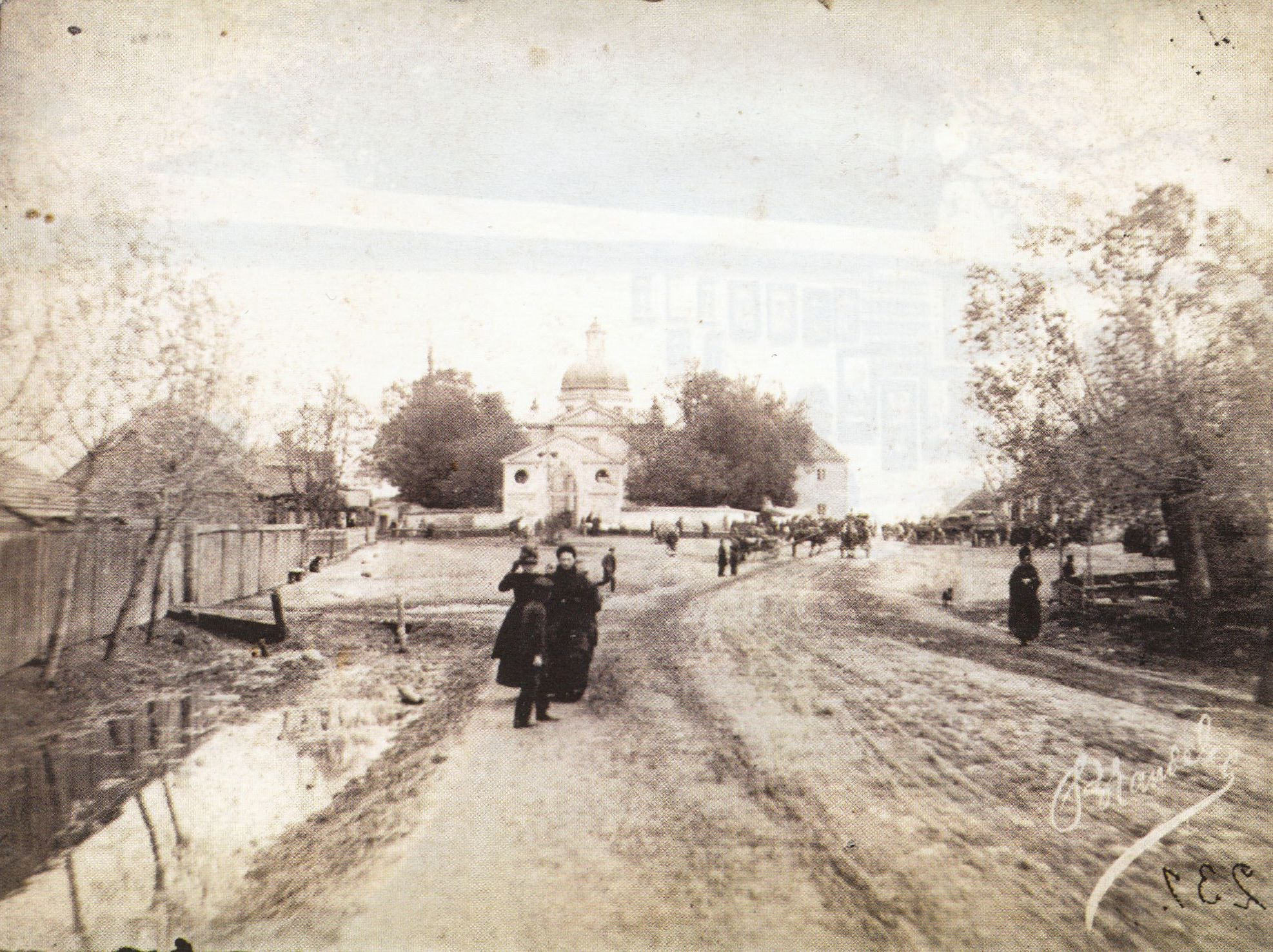 Ulica Czerniakowska, widoczny kościół św. Antoniego Padewskiego